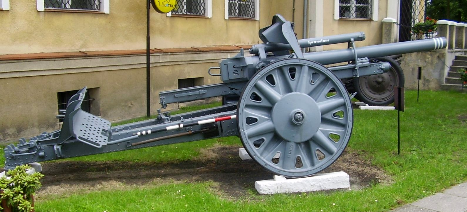 Niemiecka lekka haubica 10.5 cm leichte Feldhaubitze 18 (10.5 cm le.F.H.18). Lubuskie Muzeum Wojskowe, Poland